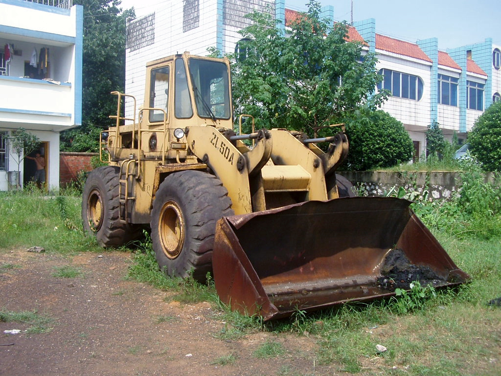 柳工ZL50A装载机停放在桂林东站站内